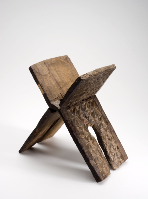 Hardhouten koranstandaard bestaande uit twee in elkaar grijpende planken, versierd met geometrische motieven. De standaard kan open en dichtgeklapt worden. De standaard is bedoeld om een koran tijdens het gebruik op neer te leggen. Het gebruik van een koranstandaard tijdens het lezen van de Koran is in overeenstemming met de islamitische reinheidsvoorschriften en toont respect voor de Koran. Koranstandaards worden zowel thuis als in moskeeën gebruikt. Islamitische religieuze voorwerpen zijn meestal versierd met non-figuratieve voorstellingen, zoals geometrische patronen of florale motieven. Deze koranstandaard is versierd met geometrische patronen en is opengewerkt in het midden van de onderste helft van de beide planken. De opening heeft de vorm van een (gebeds)nis oftewel mihrab en vormt een stijldetail dat veelvuldig op koranstandaards voorkomt.